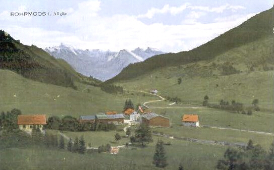 Rohrmoos im Allgäu